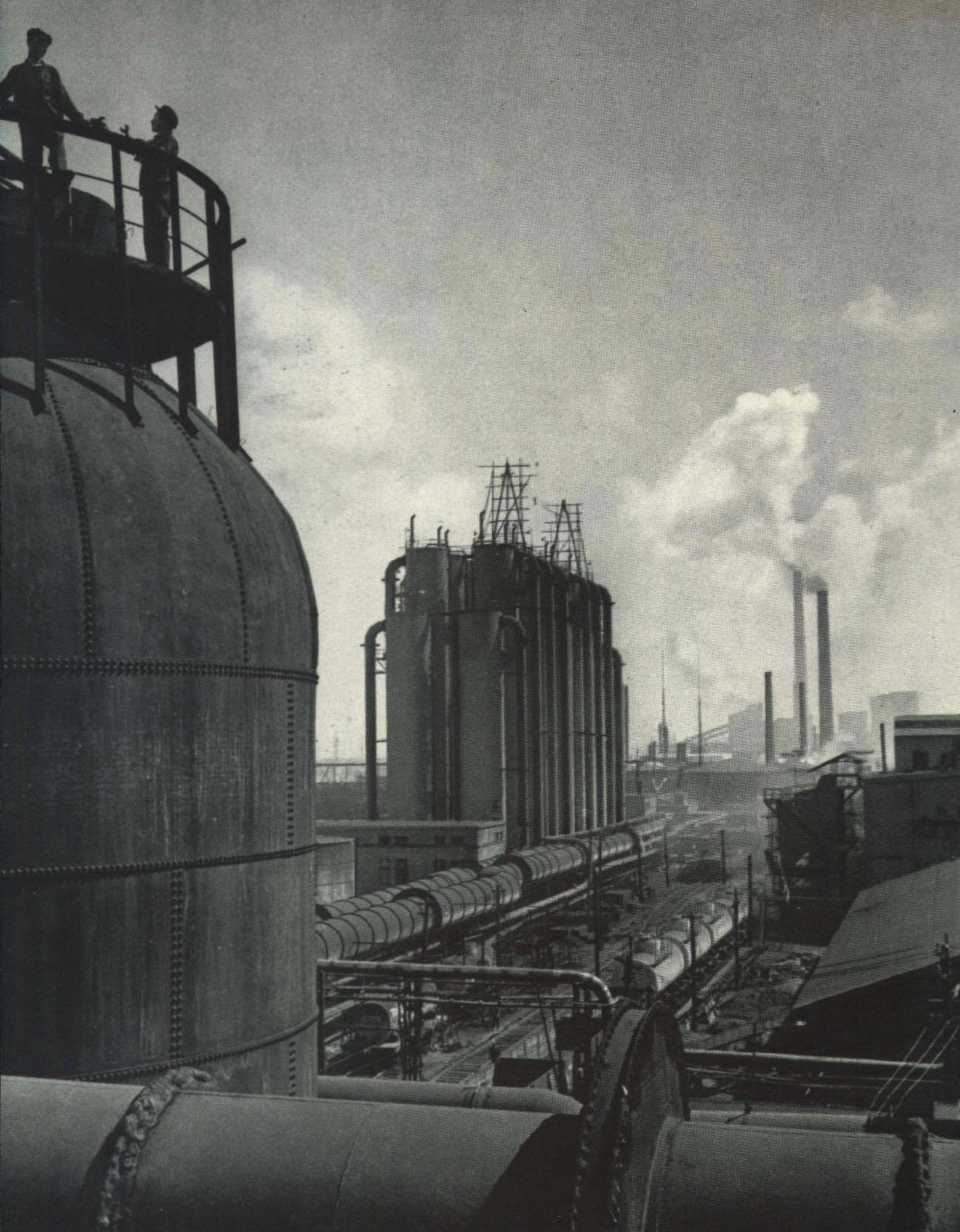 1963-11 1963 抚顺石油厂